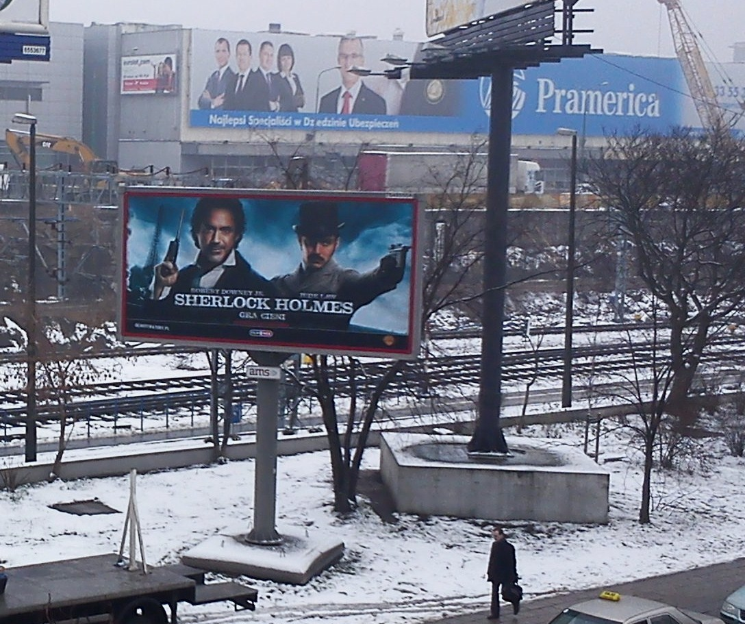 Dworcowa street, Poznań.